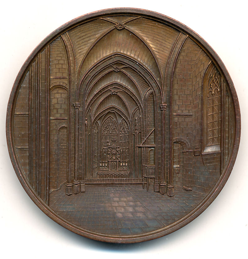 Avers de la médaille frappée en 1849